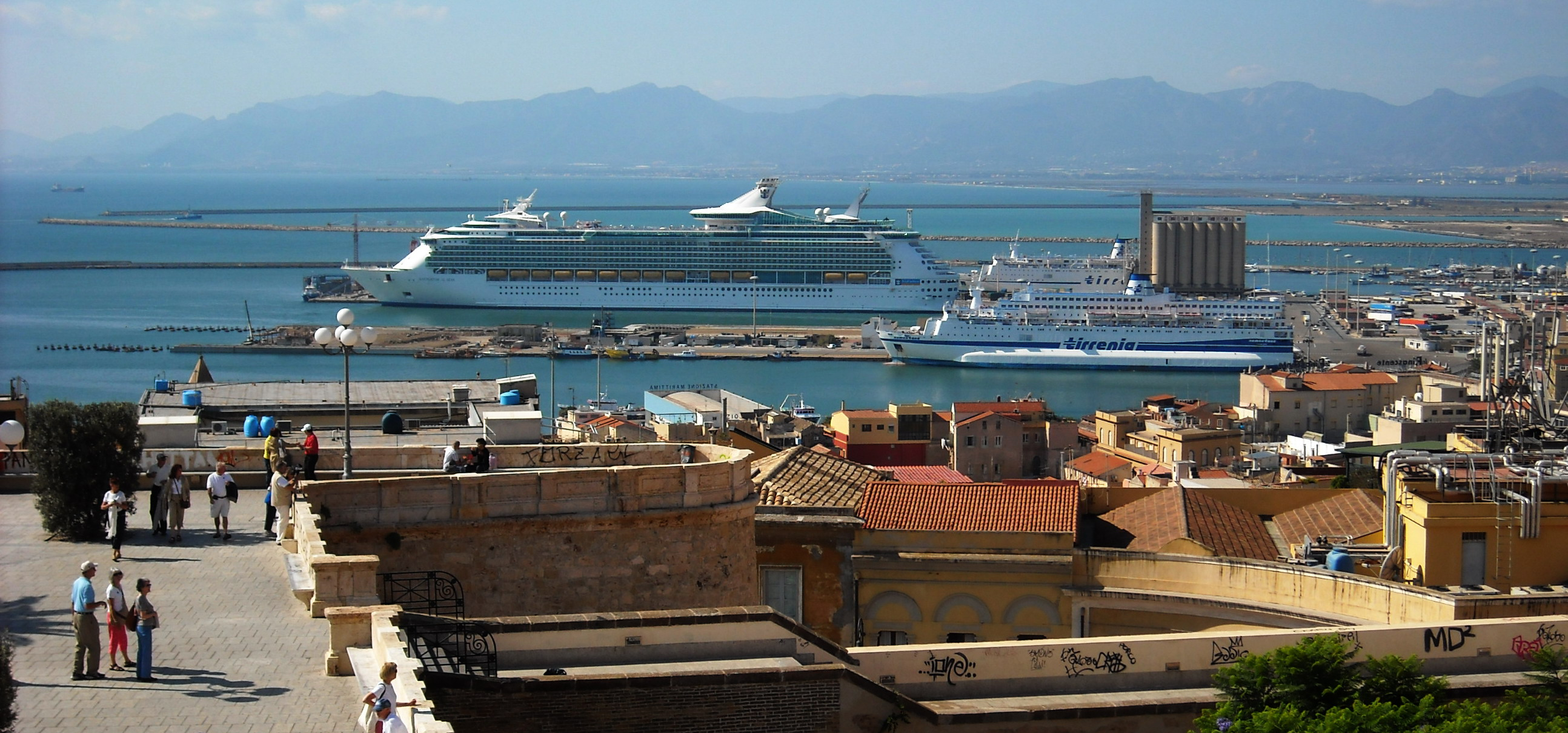 Navigator of the Seas nel porto di Cagliari